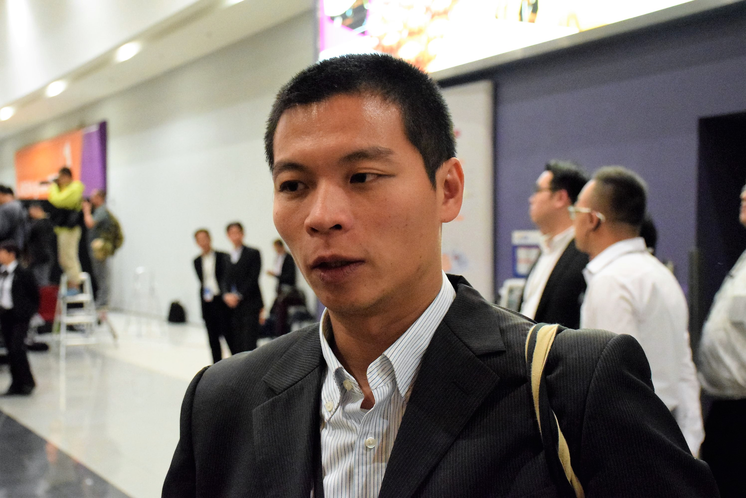 中文（香港）: 香港特首選舉高教界選委呂秉權 (VOA湯惠芸攝)